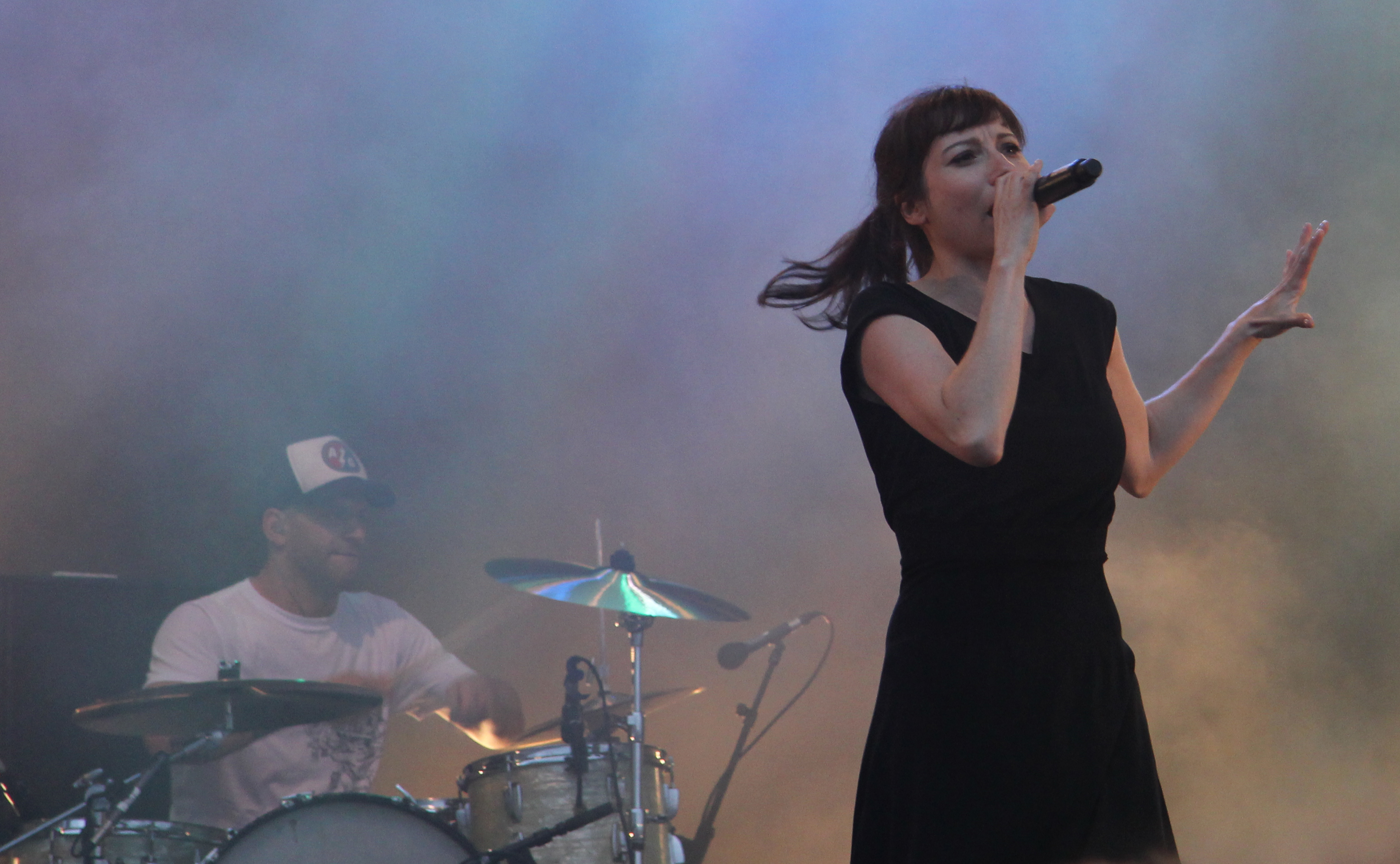 Fiva (Nina Sonnberg) bei einem Auftritt bei Rock am Ring 2012